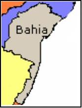 Mapa da Bahia em 1709.